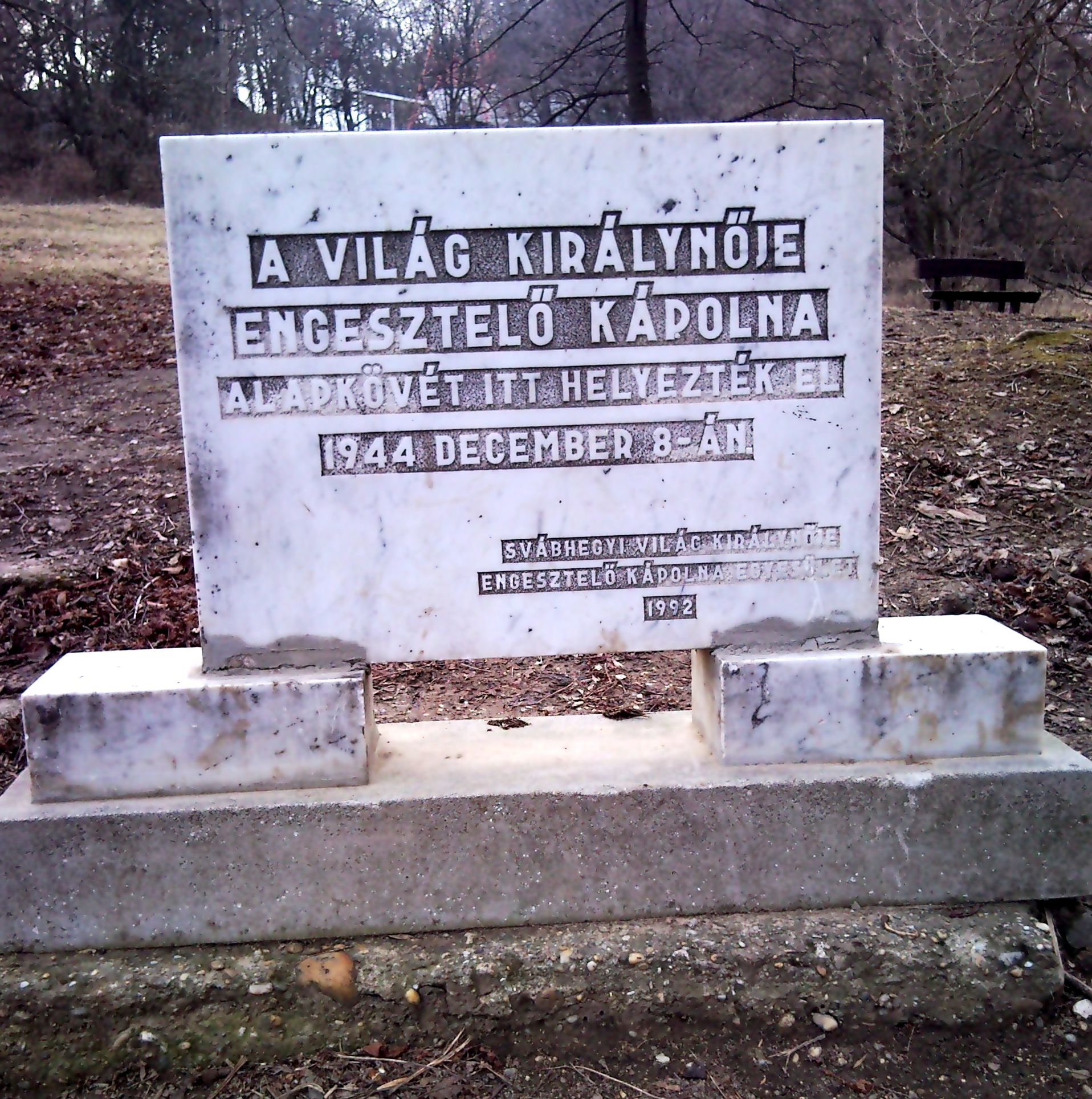 A világ királynője engesztelő kápolna helye, Budapest XII. kerület, Anna-rét